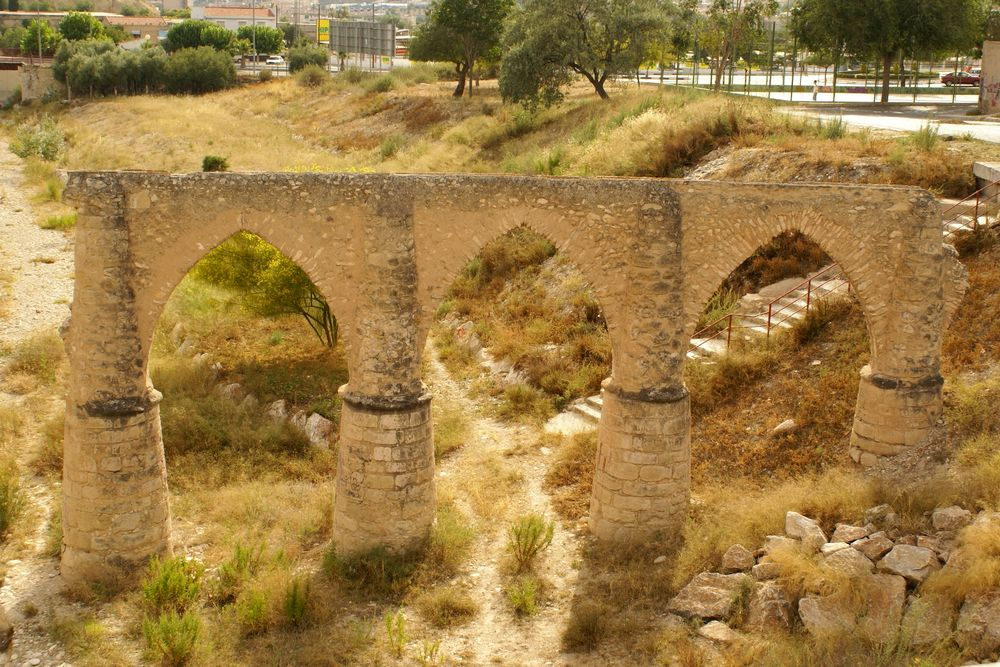 Acueducto morisco en el barrio de San Rafael de Petrel (Alicante, España).